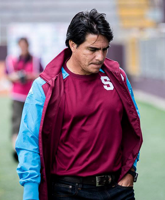 23-10-2016. Vladimir Quesada como asistente técnico del Deportivo Saprissa previo al juego ante el Santos de Guápiles.